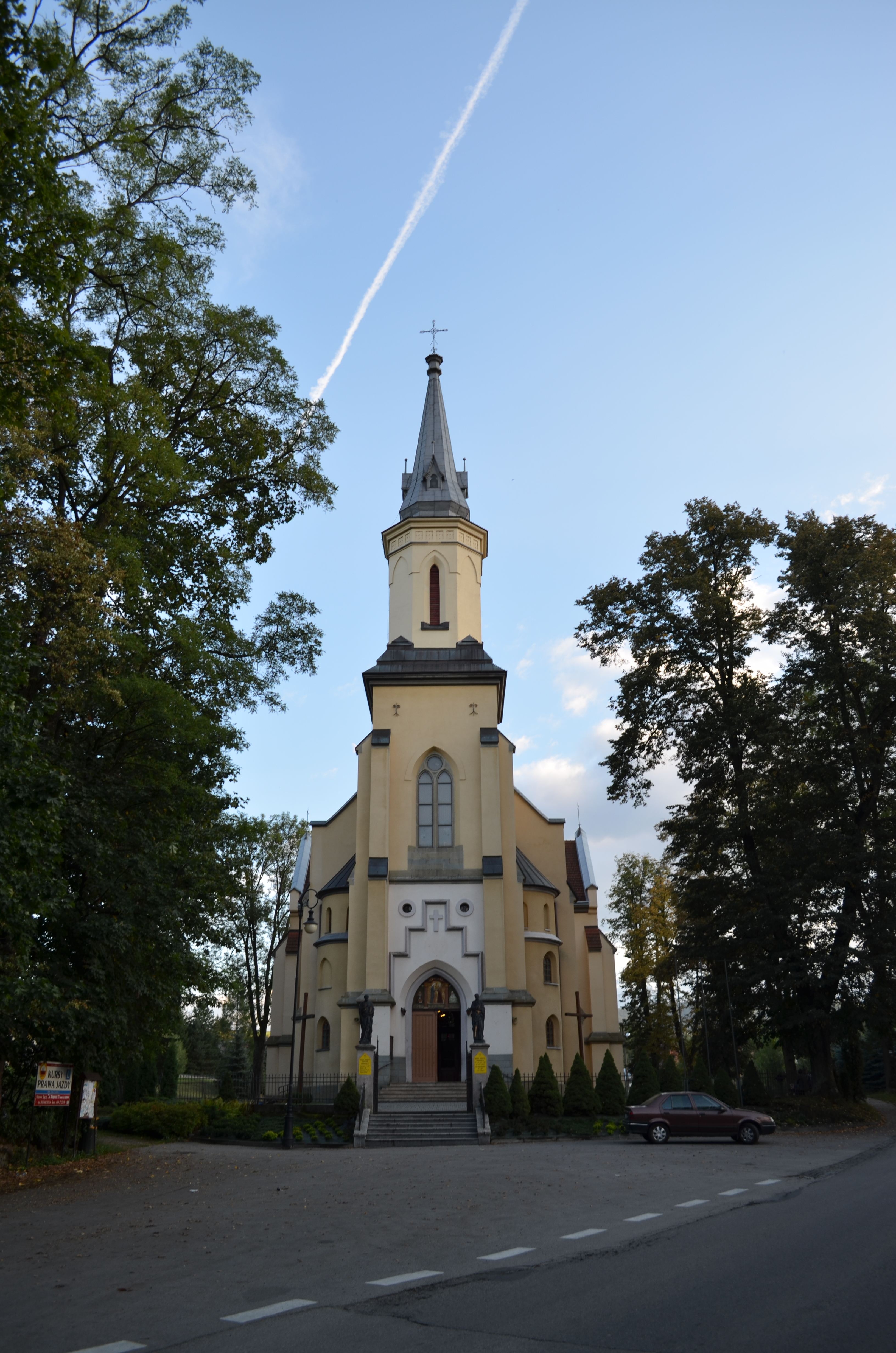 Nawojowa, kościół par. p.w. Nawiedzenia NMP, 1894-1898